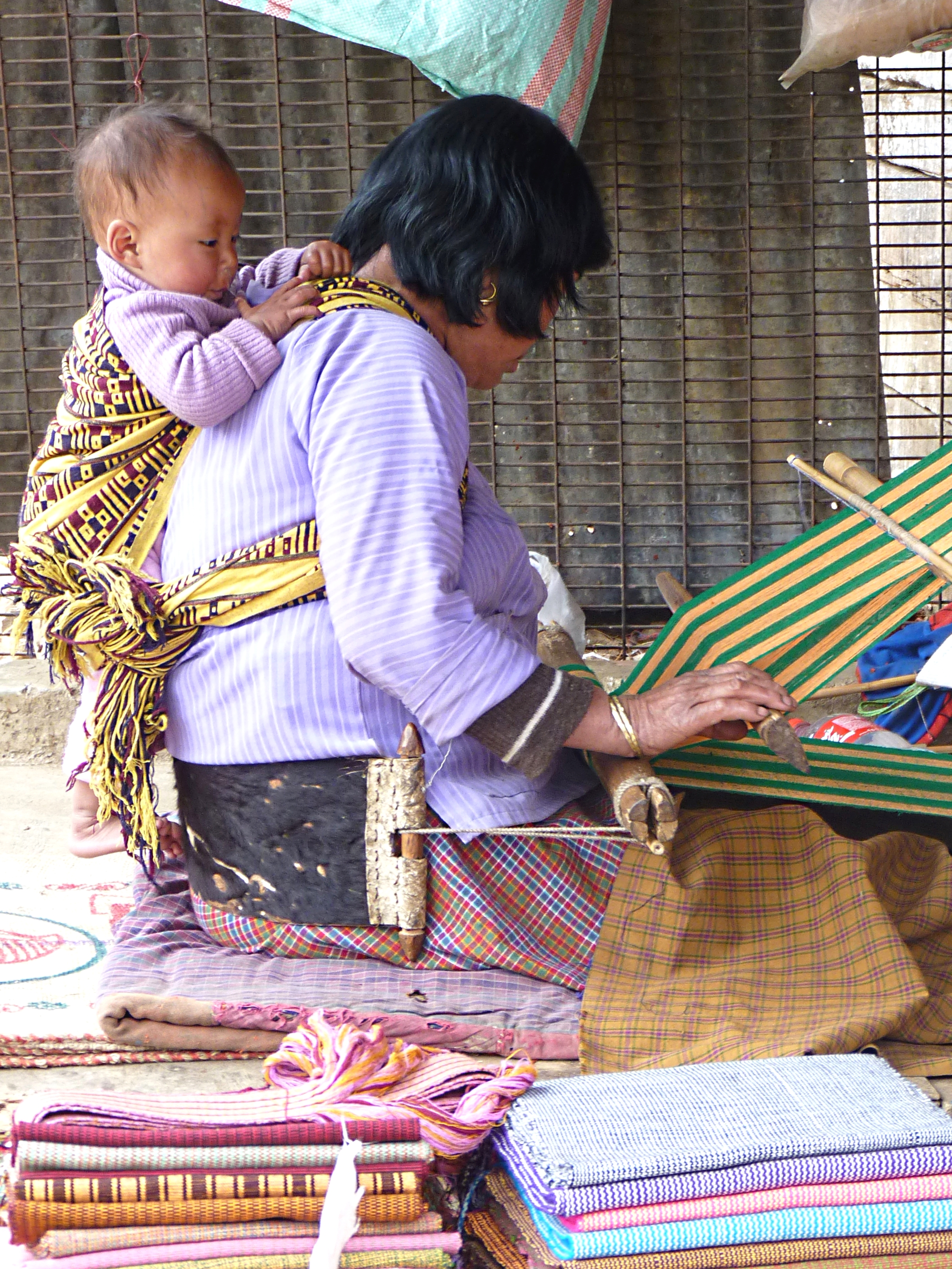 Eine Weberin aus :de:Bhutan|Bhutan am traditionellen Webstuhl mit Säugling in der Rückentrage, Thimpu